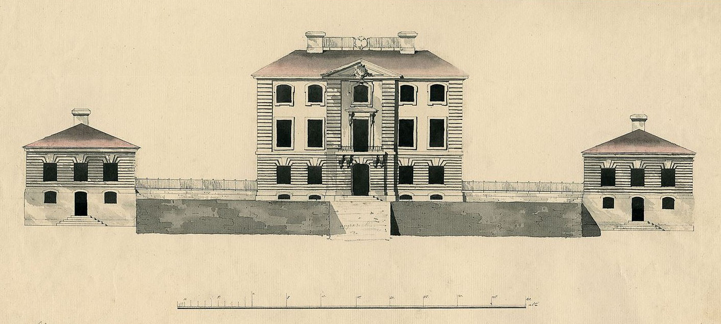 Plagierad ritning för nybyggnad av Sturehov, originalet tillskrivs Carl Hårleman